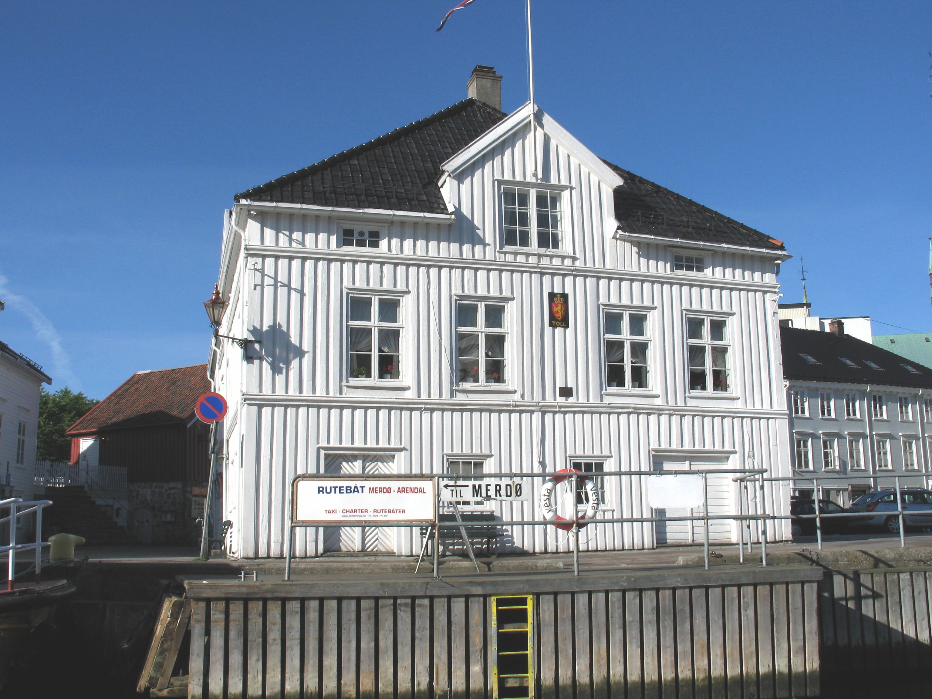 Gamle Tollboden på Tyholmen i Arendal